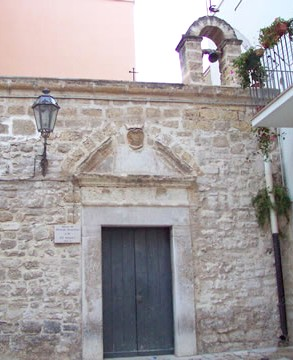 Chiesa di Sant'Andrea o del miracolo eucaristico; tradizione vuole fosse la casa dell'Ebrea in cui avvenne il miracolo